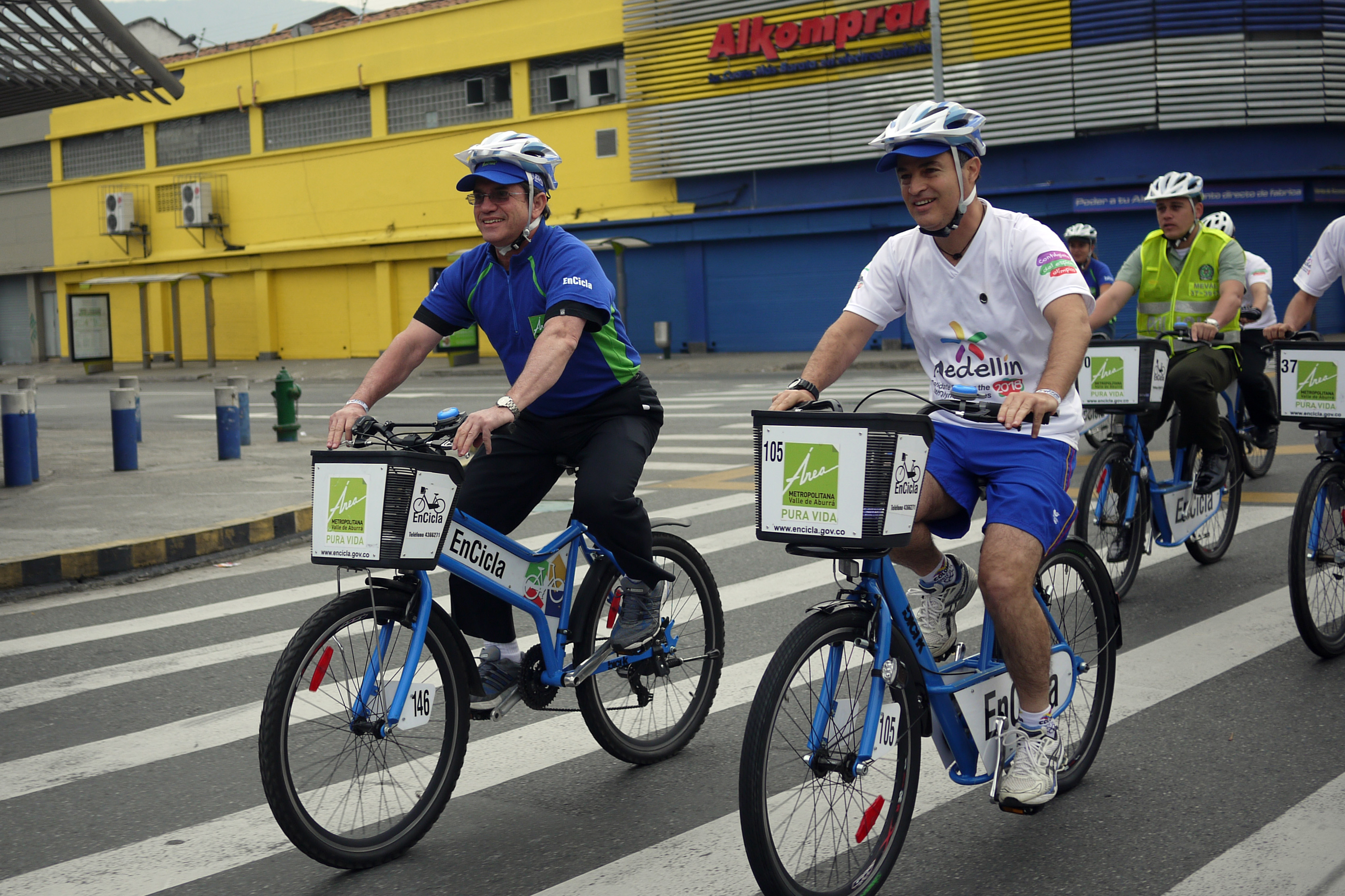 Medellín (Colombia), 15 de septiembre del 2012. Ministro de Relaciones Exteriores, Comercio e Integración Ricardo Patiño junto al alcalde de la ciudad de Medellín Aníbal Gaviria Correa, realizaron un recorrido, en las bicicletas públicas del Área Metropolitana. Foto: Xavier Granja Cedeño - Ministerio de Relaciones Exteriores